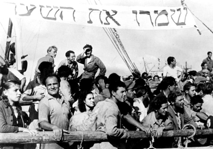 אוניית המעפילים חביבה רייק - מעפילים צופים